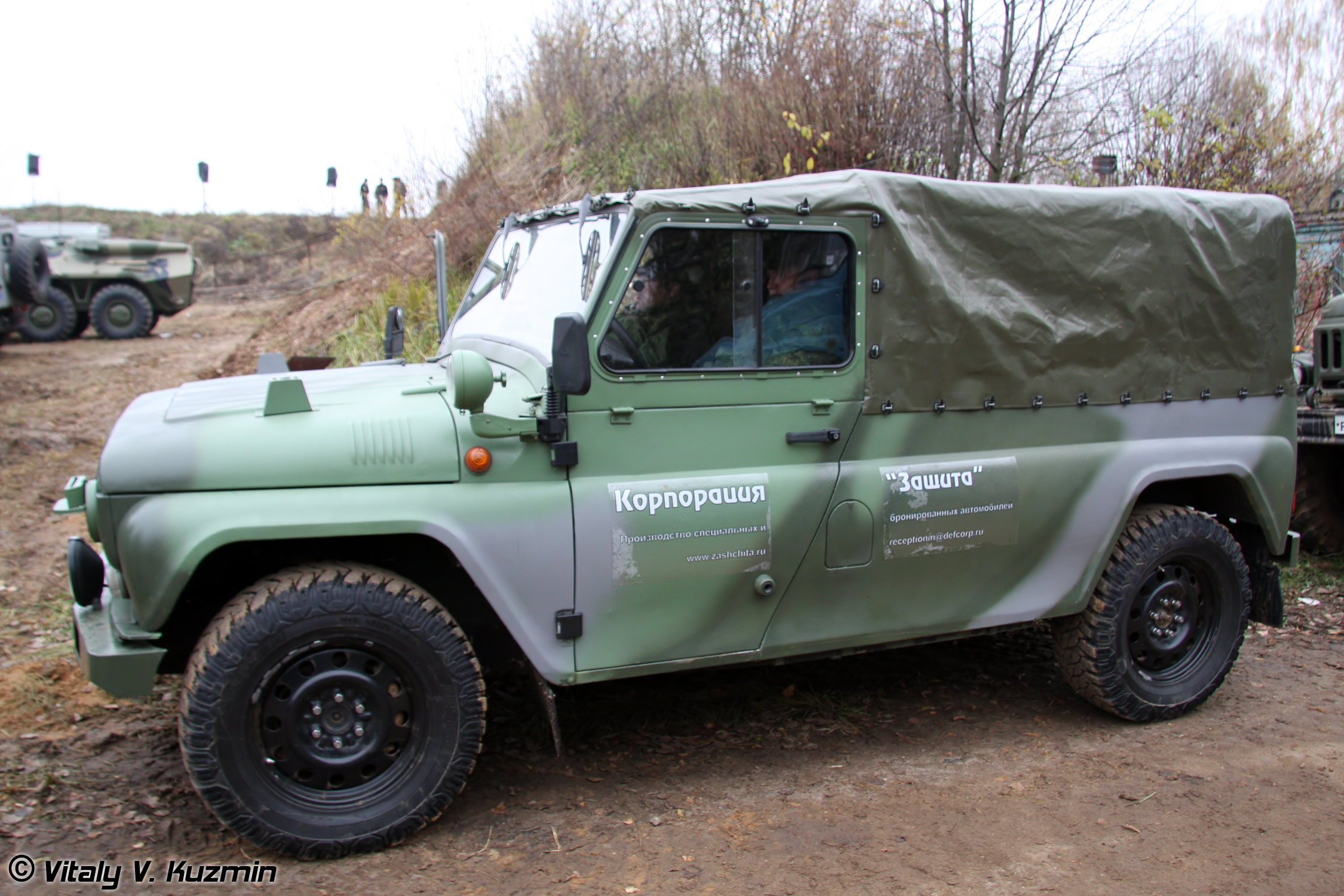 Скорпион-ЛША (Skorpion-LShA)